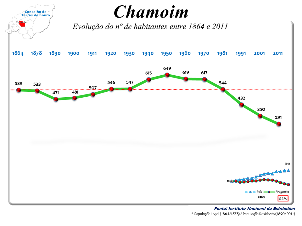 Censos 1864/2011